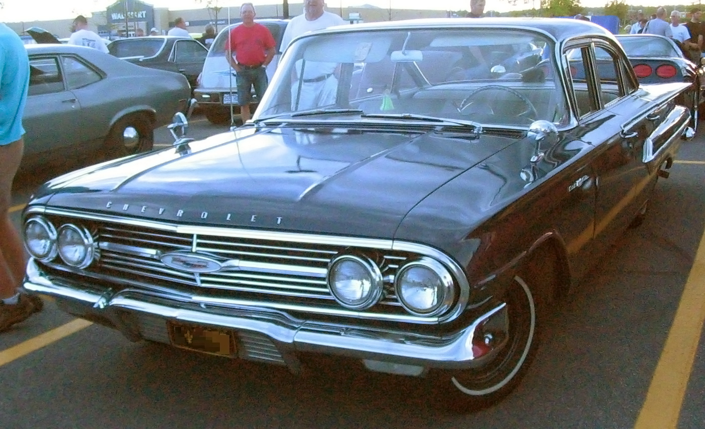 1960 Chevrolet Bel Air photographed in Vaudreuil-Dorion, Quebec, Canada at the Auto classique Bellepros Vaudreuil-Dorion.